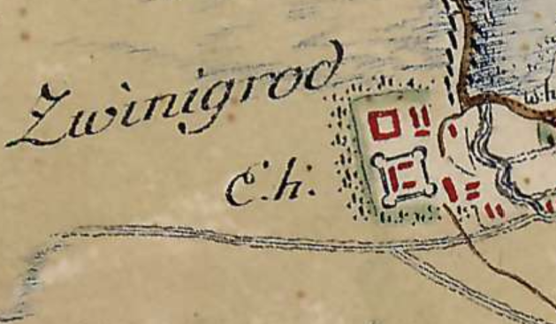 18століття